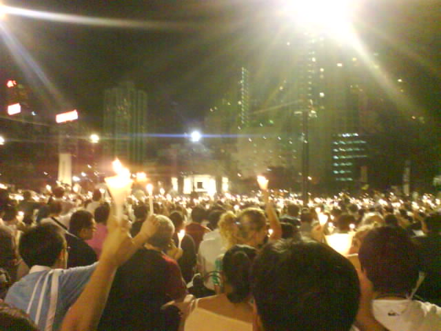 六四18週年